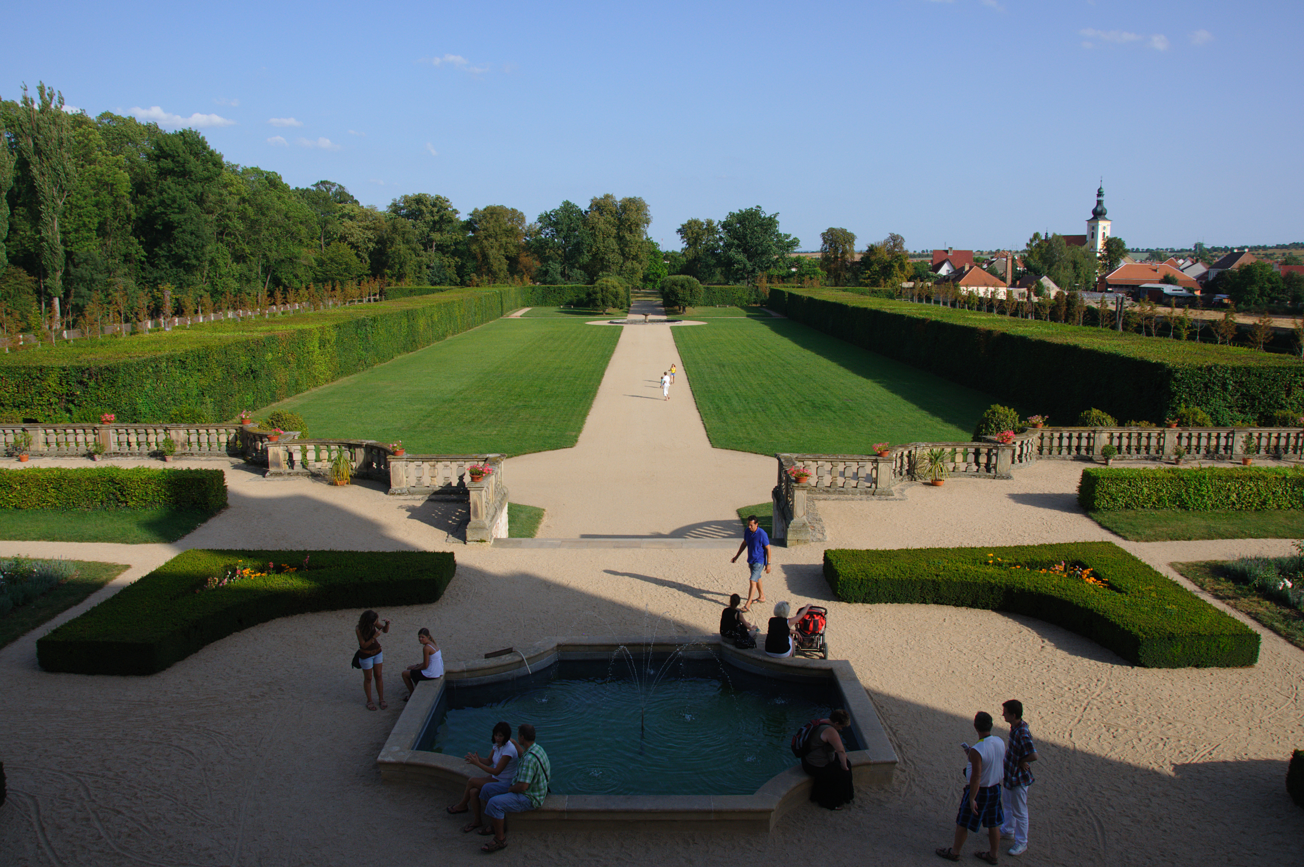 Zámocká záhrada